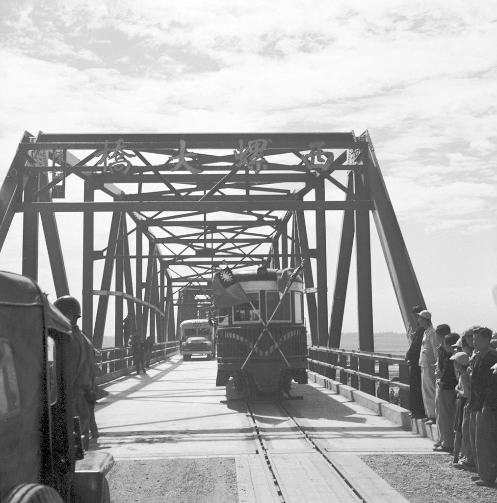 西螺大橋一景。